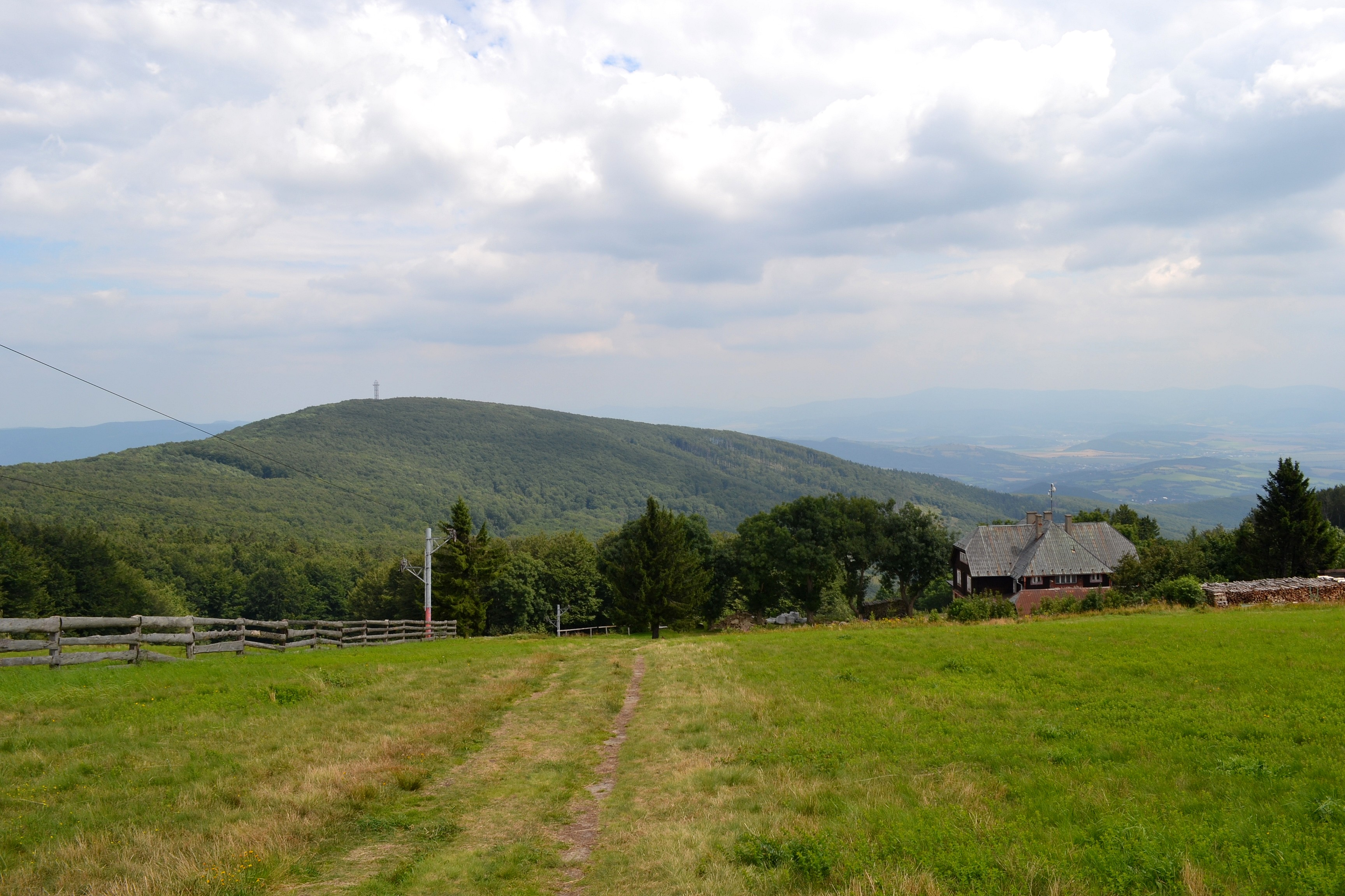 Pohľad z úbočia Veľkej Javoriny na vrch Jelenec (925 m n.m.)